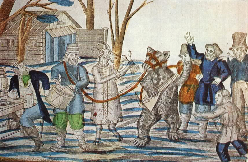 Лубок «Медведь и коза».